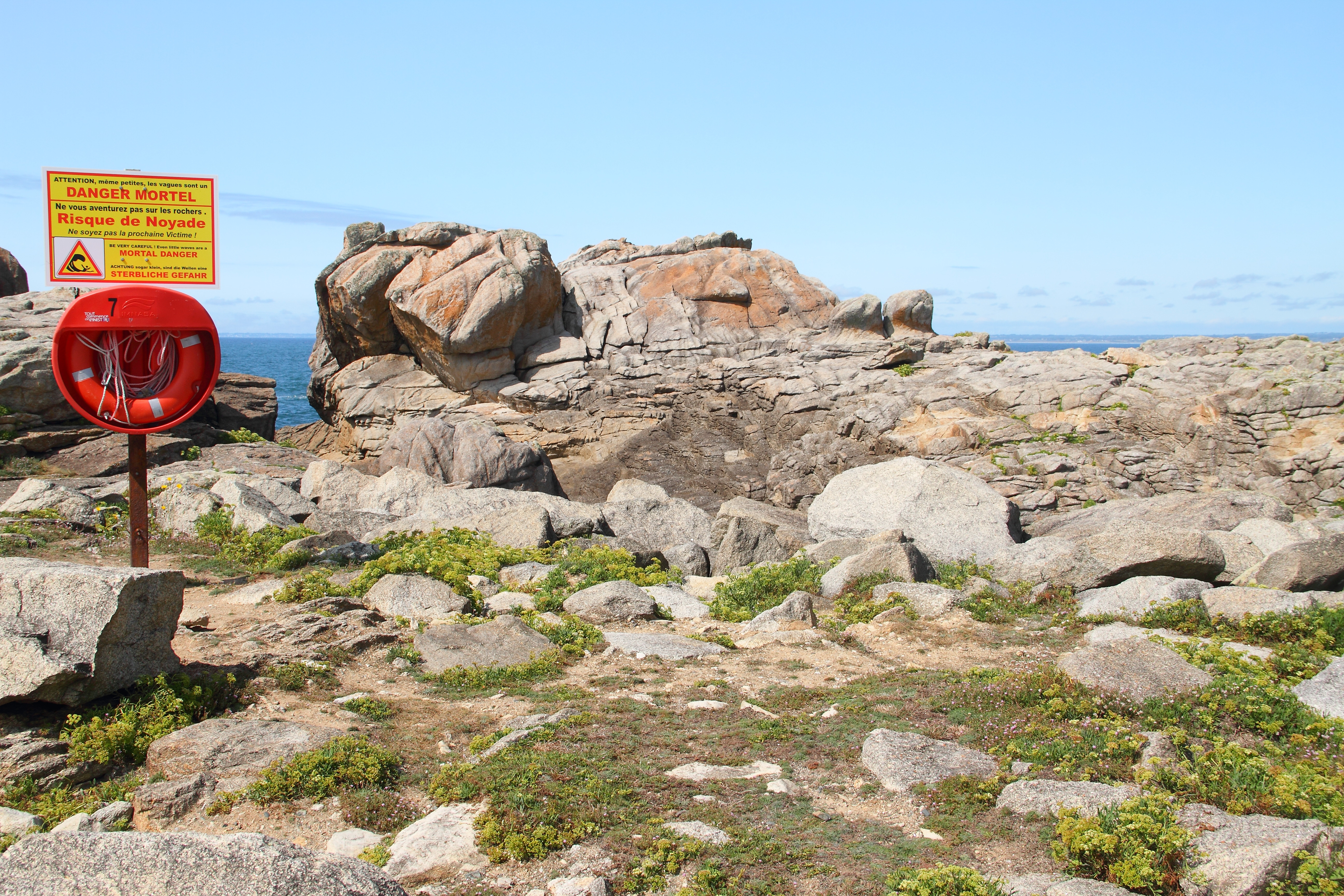 Die Felsküste bei Saint-Guénolé in der bretonischen Gemeinde Penmarc´h.